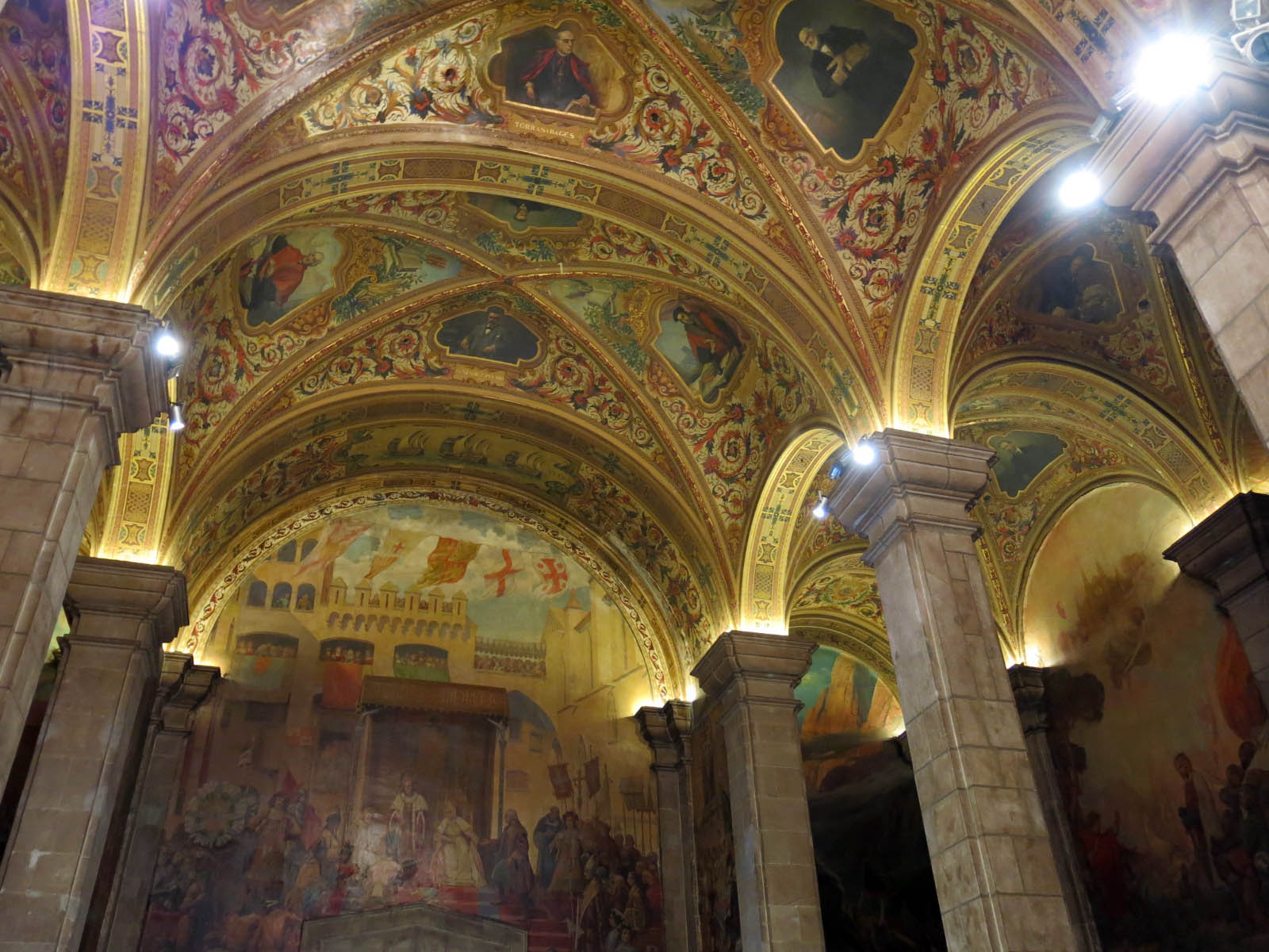 Palau de la Generalitat (Barcelona) Object location41° 22′ 58.01″ N, 2° 10′ 36.01″ E